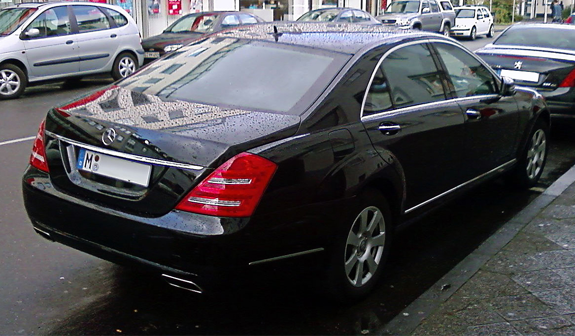 Mercedes-Benz W221 facelift 2009